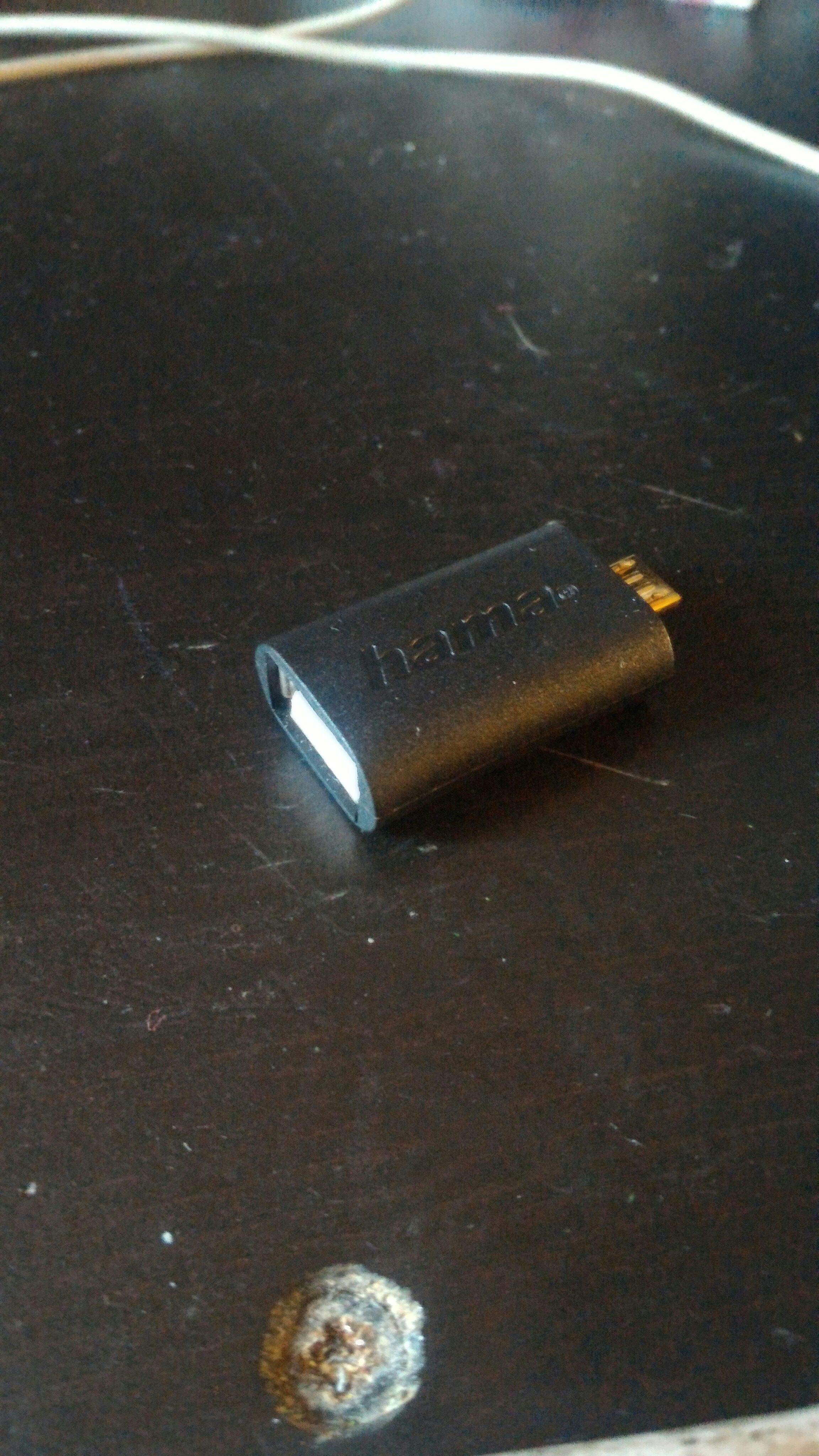 Egy vezetéknélküli OTG.